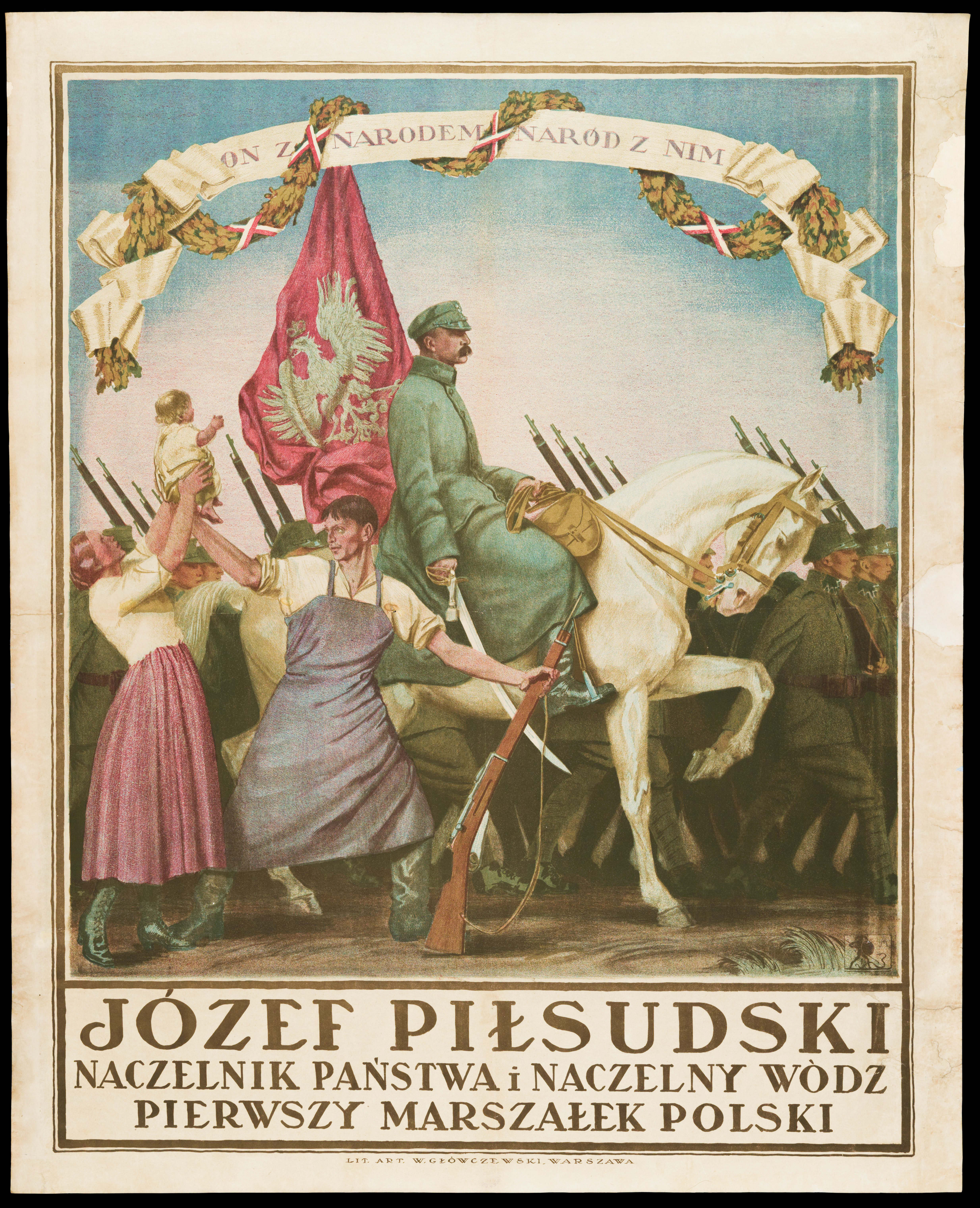 [Plakat] : Józef Piłsudski Naczelnik Państwa i Naczelny Wódz - Pierwszy Marszałek Polski, lata 30te